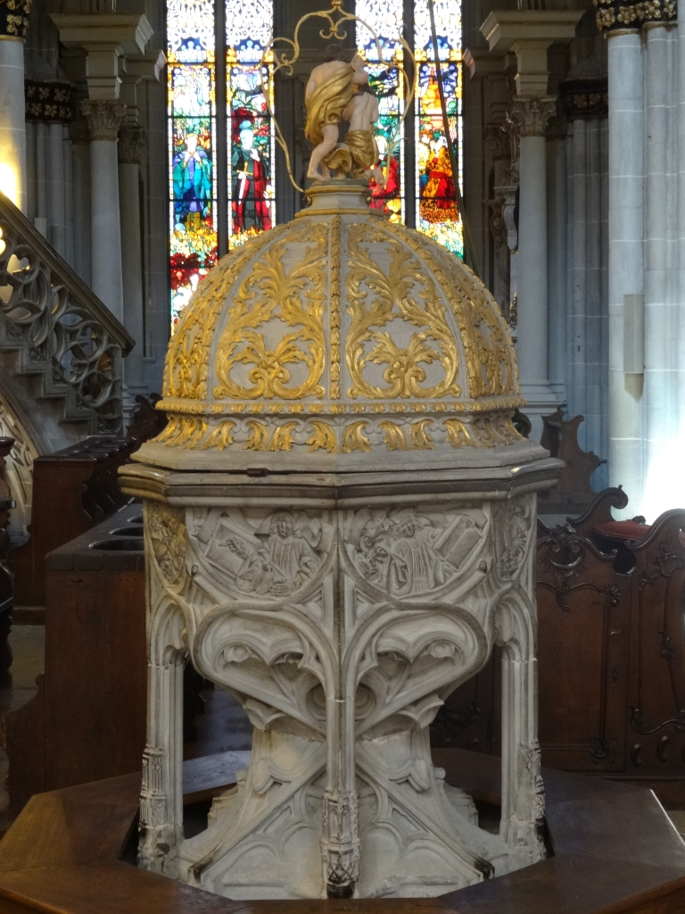 Cathédrale St-Nicolas de Fribourg (Suisse). Fonts baptismaux.